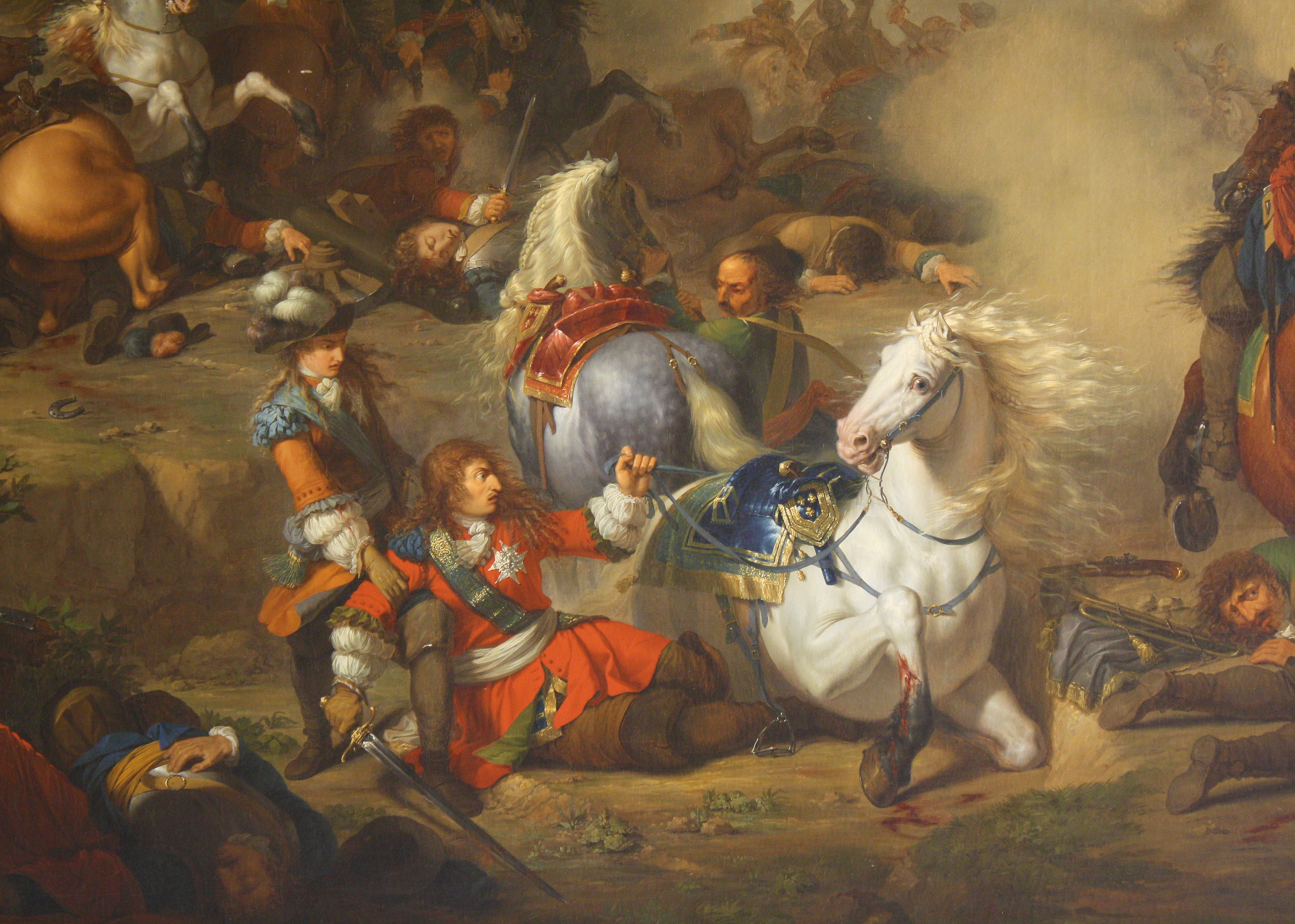 detail